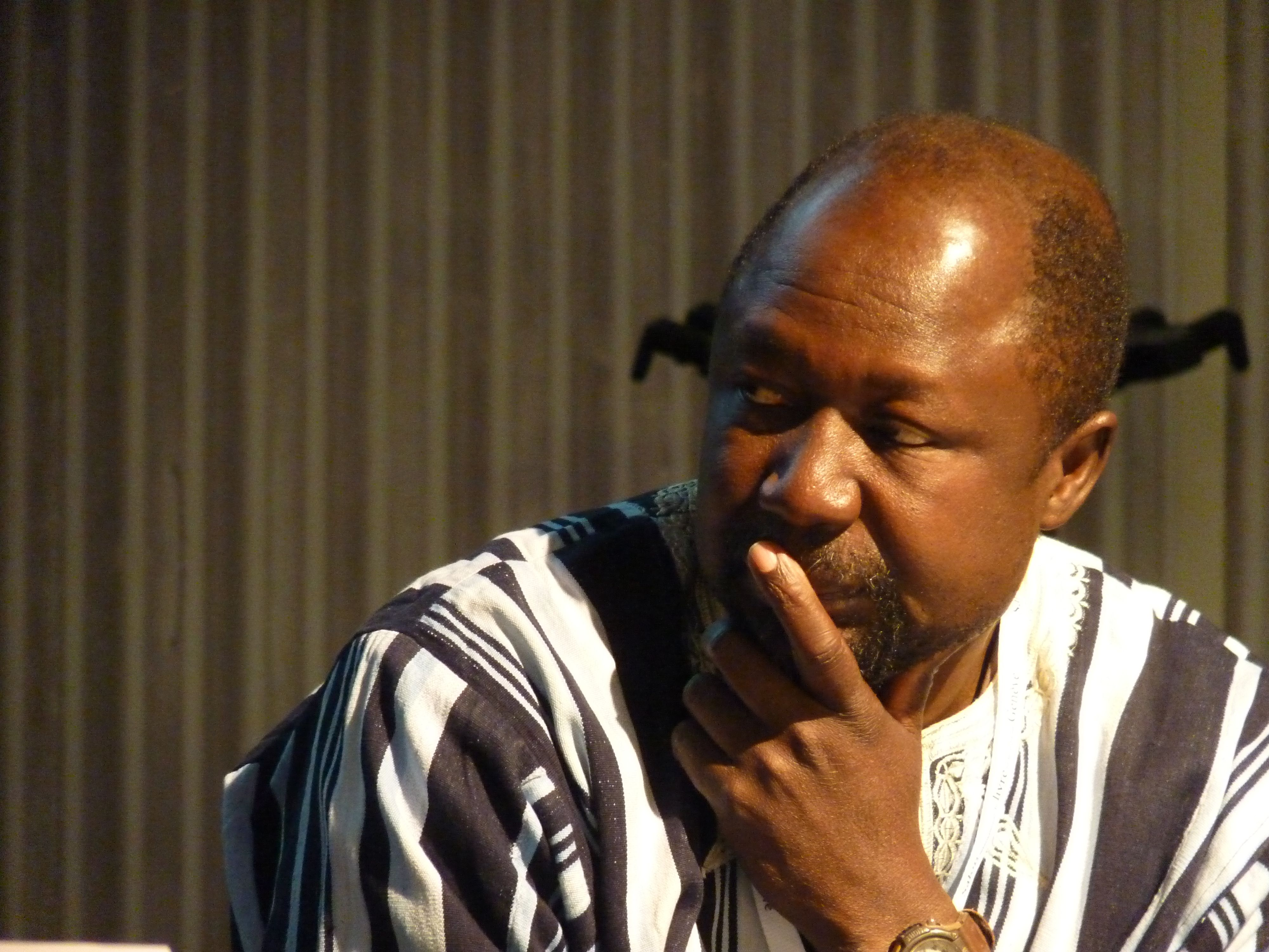 L'écrivain Koulsy Lamko au Salon du Livre de Genève en 2012